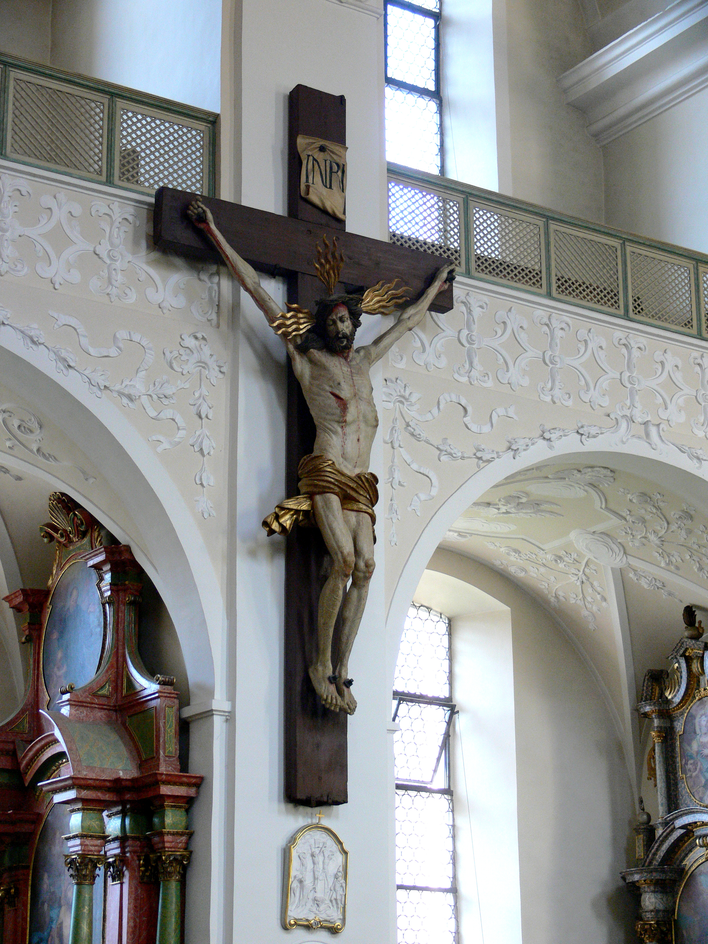 Pfarrkirche St. Peter und Paul und St. Trudpert (ehemalige Klosterkirche des Klosters St. Trupdert), Gemeinde Münstertal, Landkreis Breisgau-Hochschwarzwald Missionskreuz, Christoph Daniel Schenck zugeschrieben, 17. Jh.c